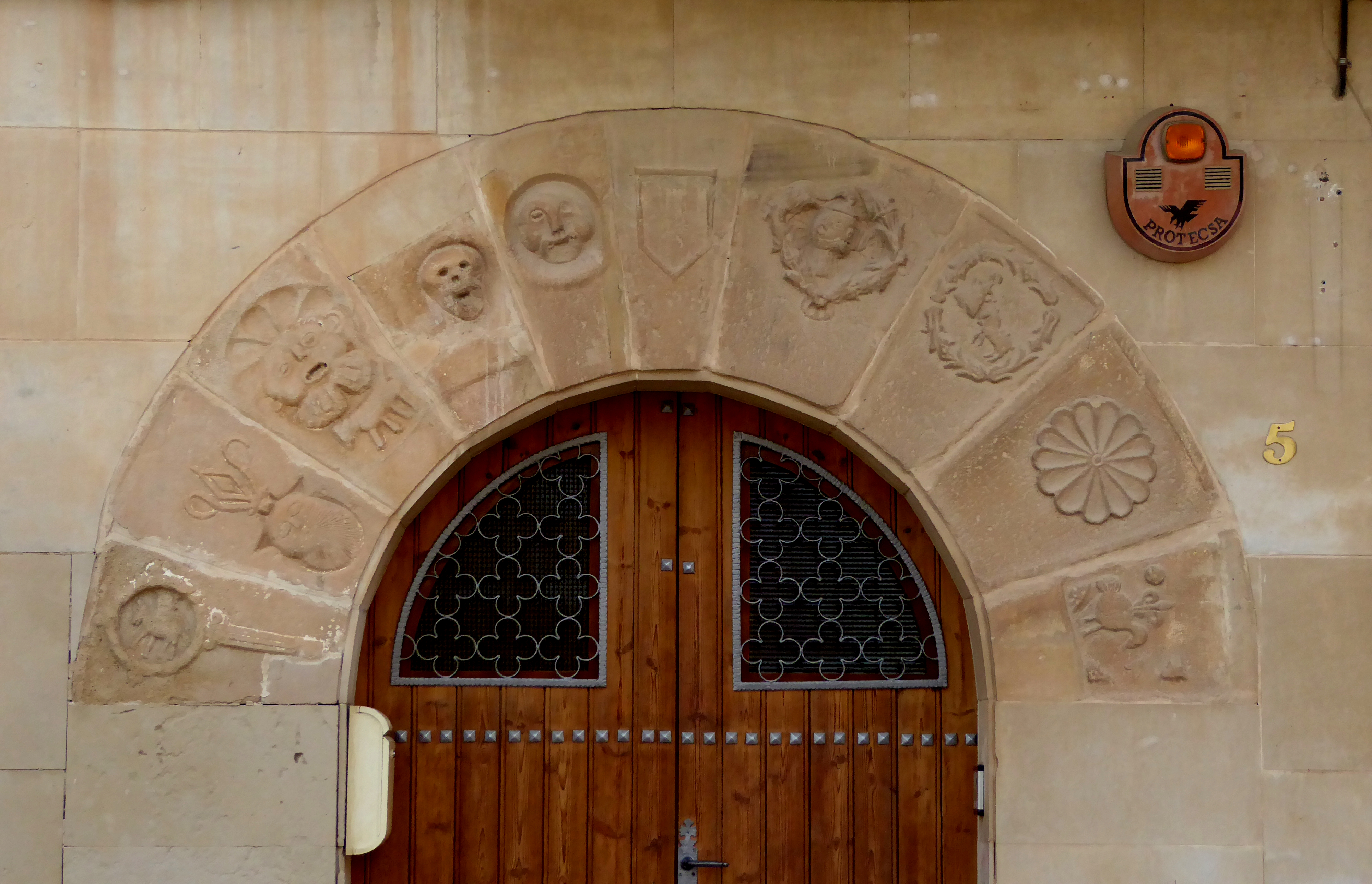 Detall de les dovelles esculpides en l'arc de mig punt de la porta del número 5 del Pla de la Vila de la Granadella (2019)